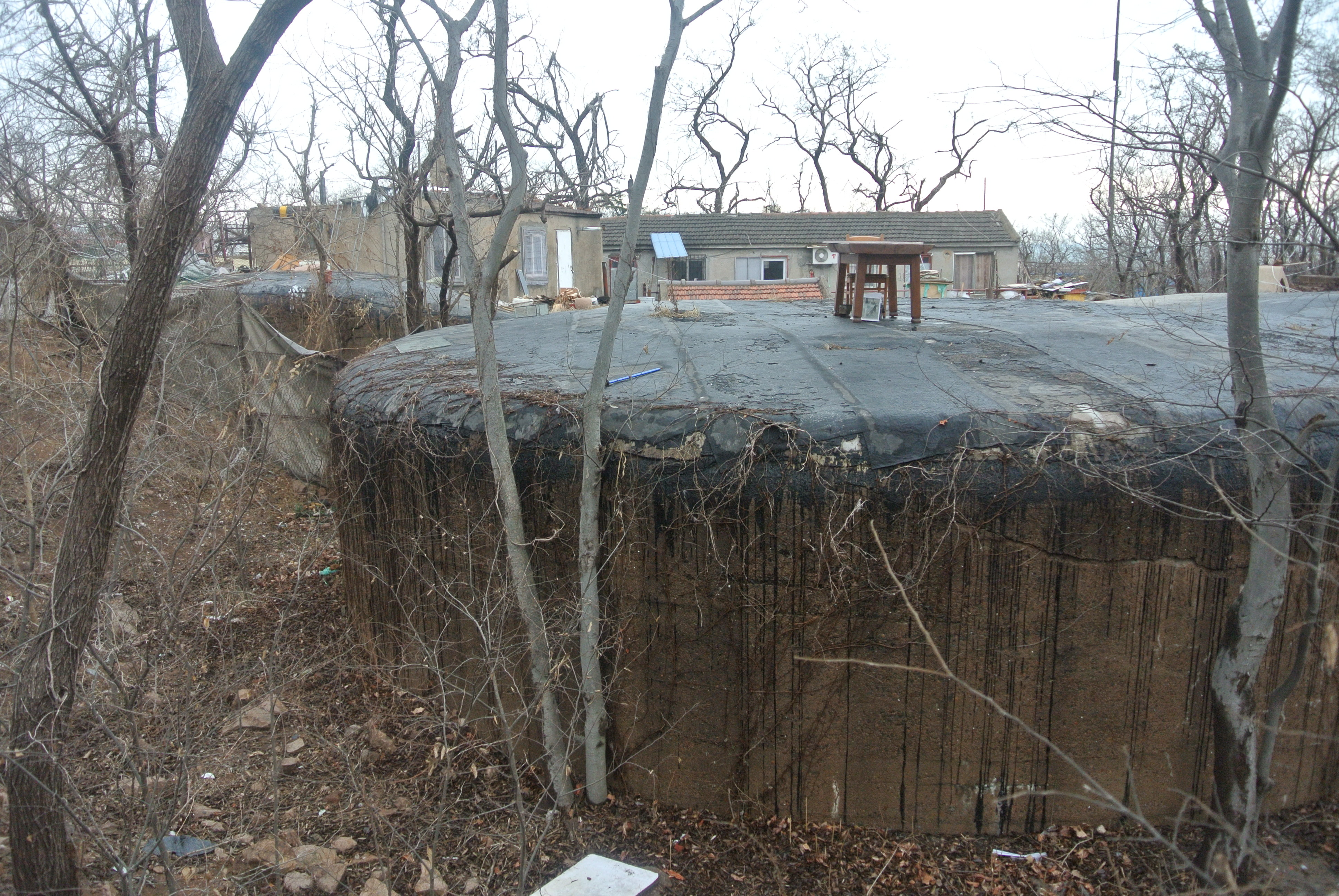 青岛台西镇炮台北掩体南端